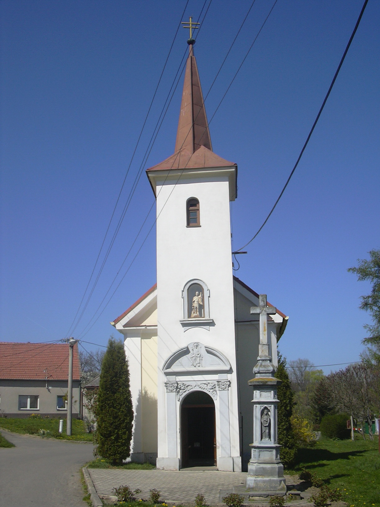 Kostel Panny Marie Vranovské Nosálovice (Vyškov- czech republic).